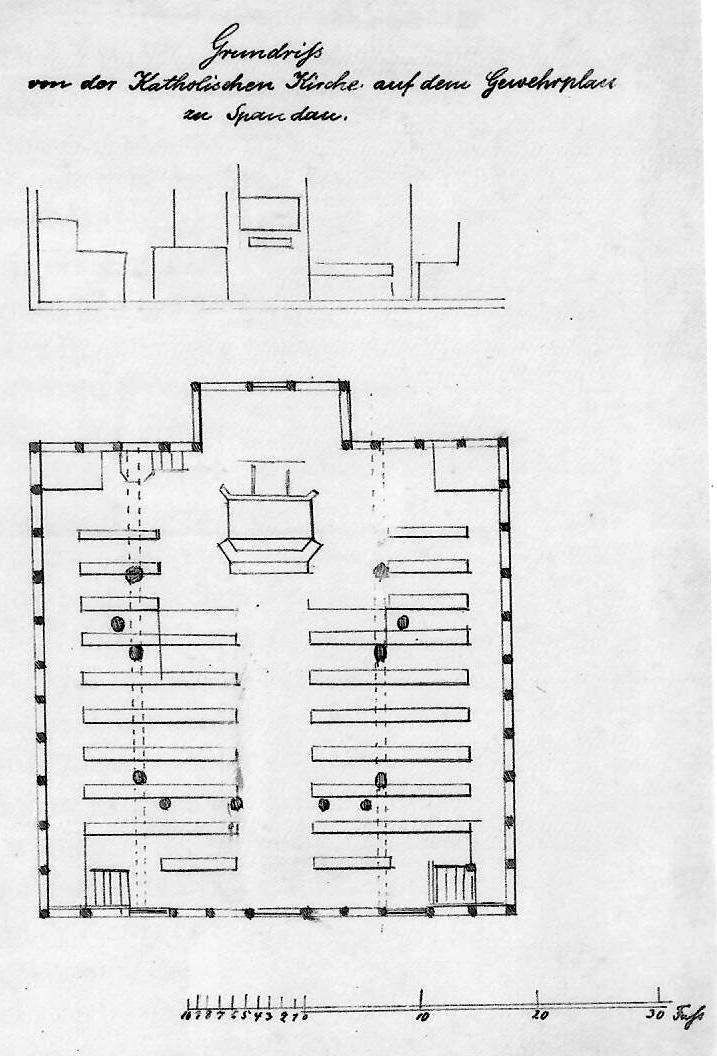 Grundriss der katholischen Kirche auf dem Gewehrplan, Berlin-Spandau (1766/67-1849) Quelle: Pfarrarchiv St. Maria - Hilfe der Christen, Berlin-Spandau; abgedruckt in: Helmut Kißner, Cordia Schlegelmilch: Die Kirche St. Marien am Behnitz in Spandau. Ein vergessenes Werk August Sollers. Berlin 2004, S. 26.